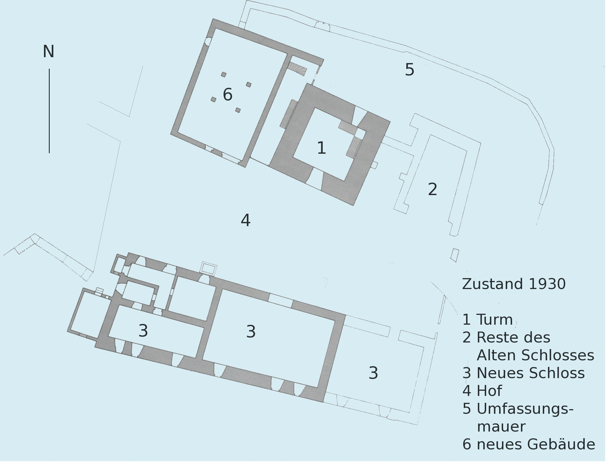 Grundrissplan vonde:Schloss Brandis